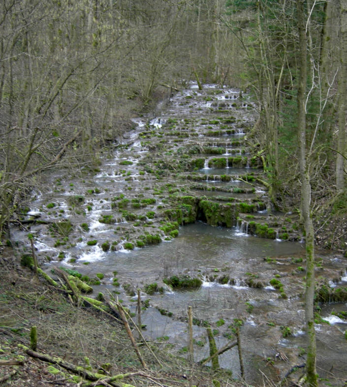 Sinterterrassen der Lillach bei Weißenohe am Frankenweg, vgl. Bilder und Wegbeschreibung vom Frankenweg von Egloffstein nach Lillinghof